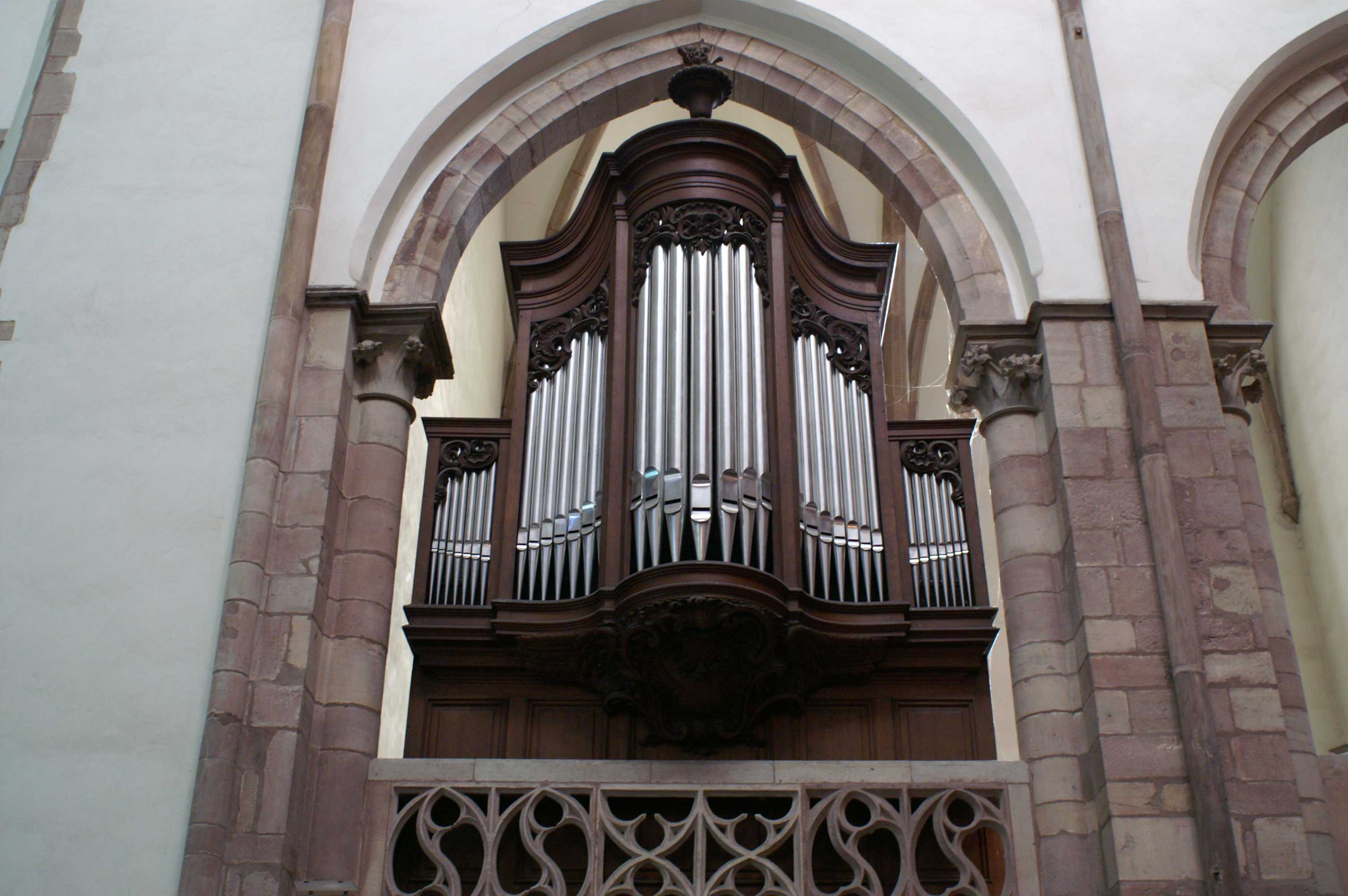 Strasbourg - Eglise St Thomas - Orgue de choeur concu en 1905 d'après les directives d'Albert Schweitzer / St Thomas Church - Choir organ build in 1905 based on Albert Schweitzer work